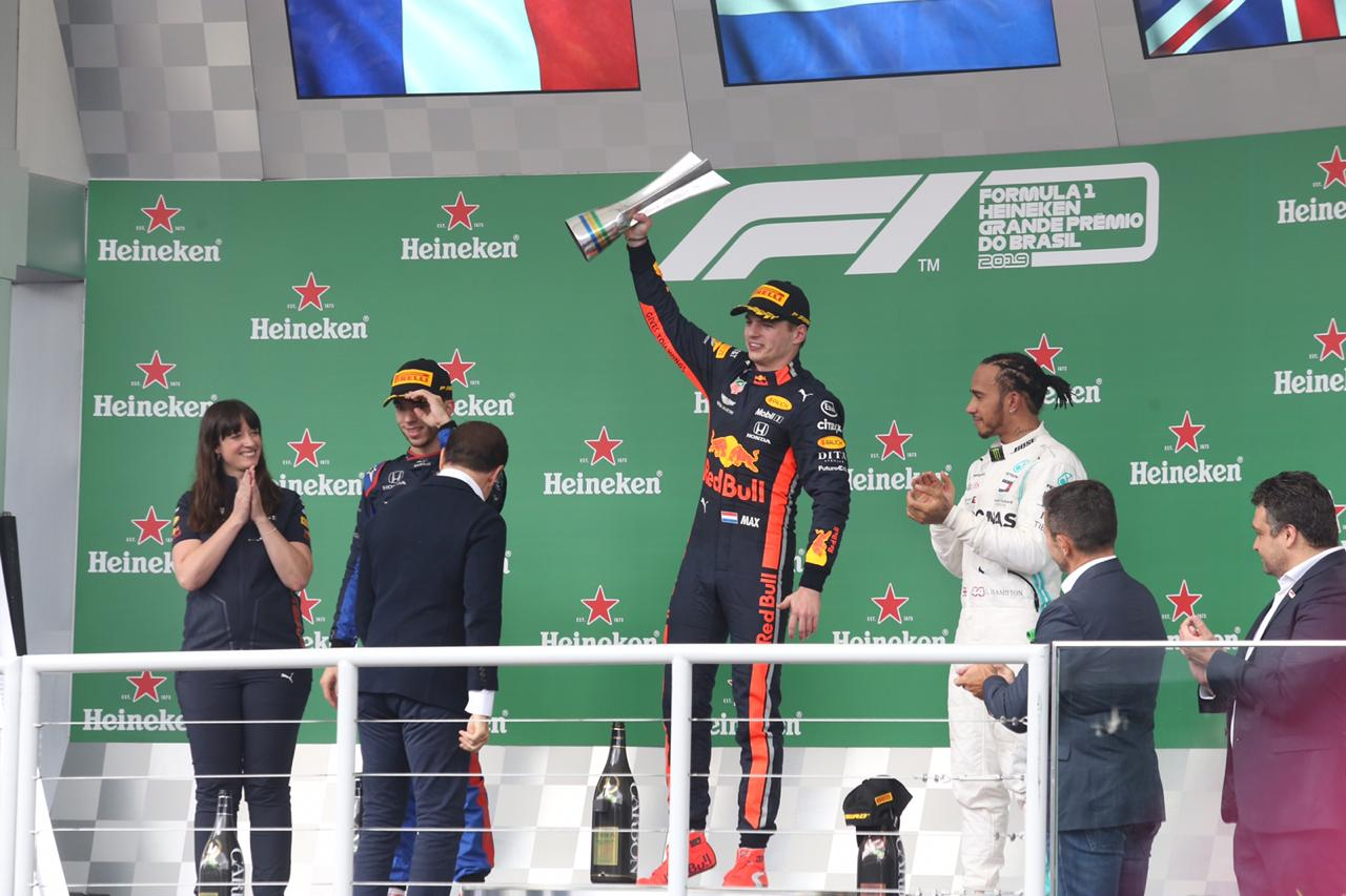 Governador do Estado de São Paulo, João Doria, durante Grande Prêmio do Brasil de F1 2019. Local: São Paulo/SP. Data: 17/11/2019